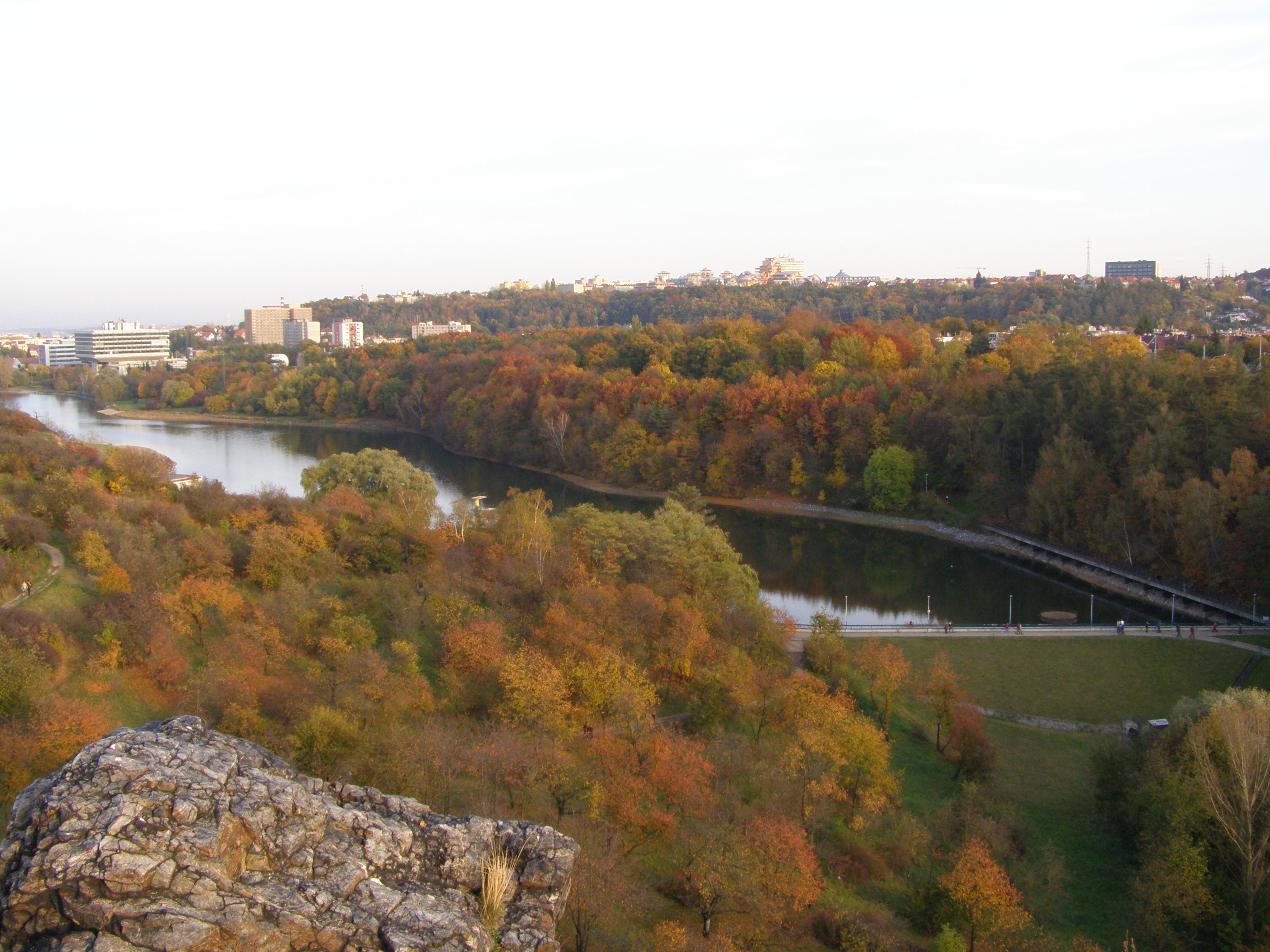 Praha, Vodní nádrž Džbán